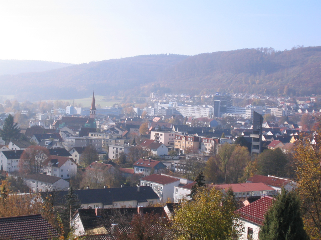 Bild von Oberkochen